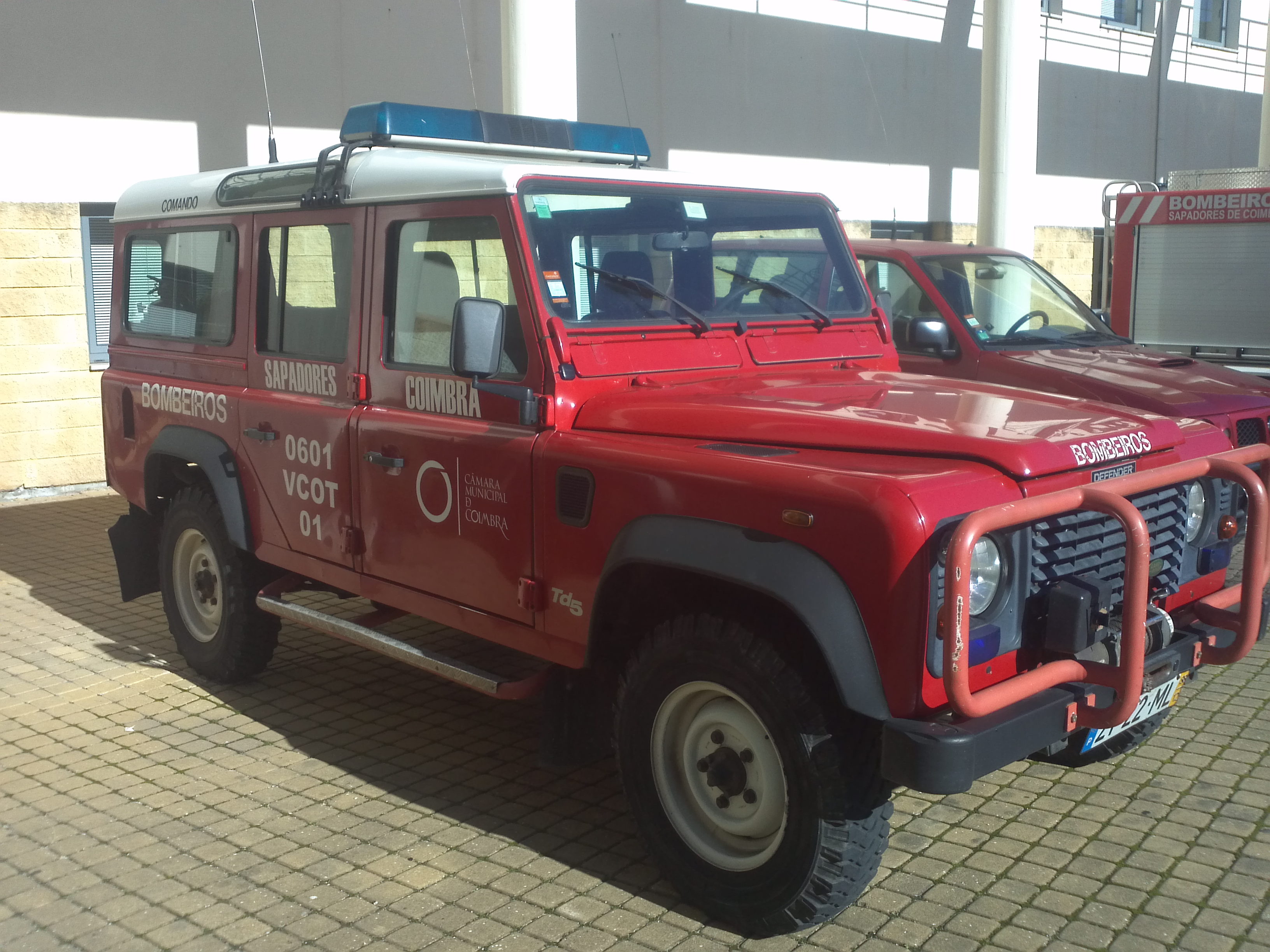 Veiculo de Comando Táctico 01